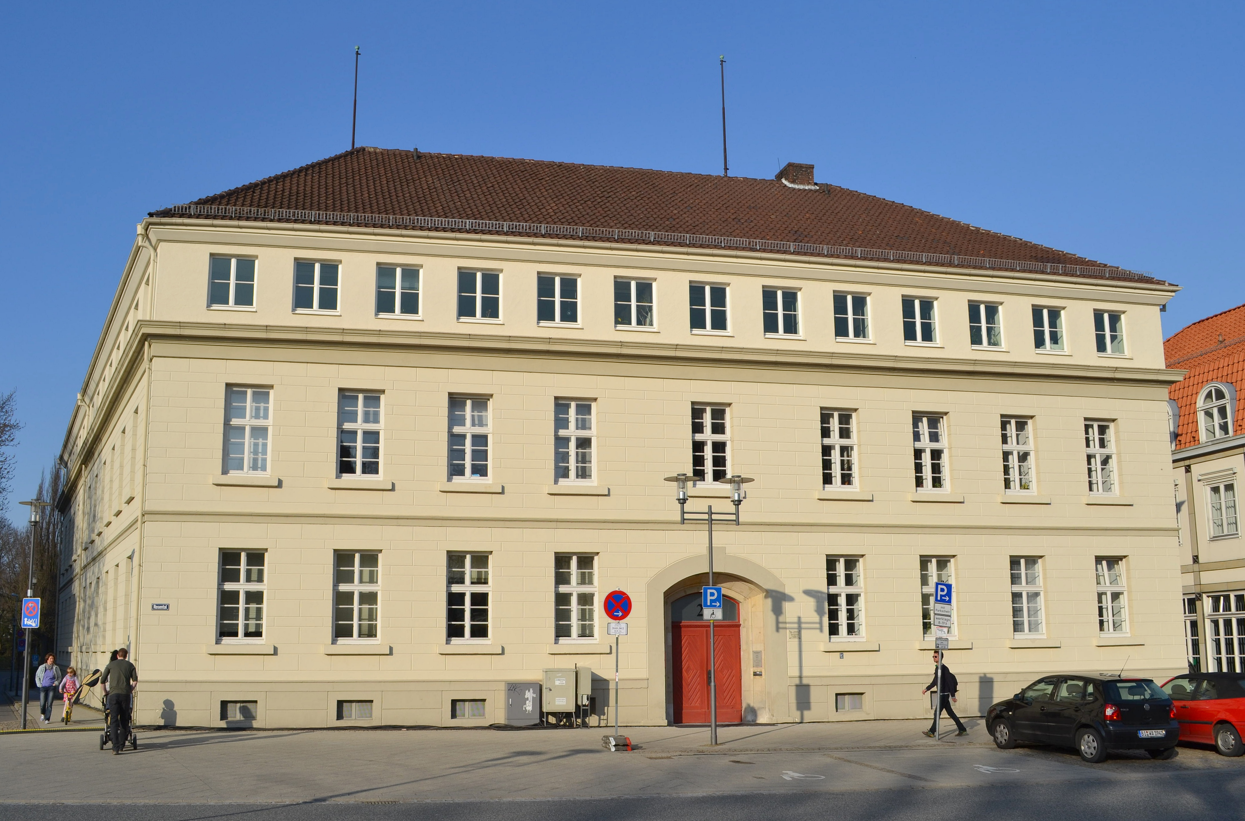 Baudenkmal Detmold Nr. 51 - ehemaliges Offiziantenhaus Rosental 21